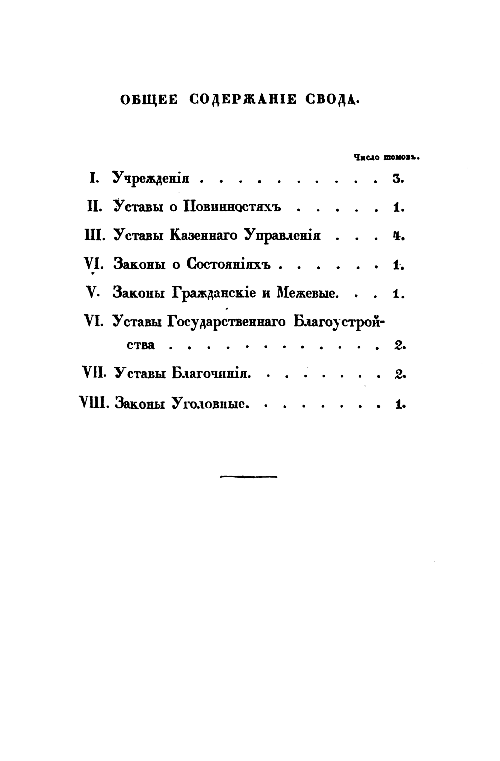 Оглавление свода законов Российской империи